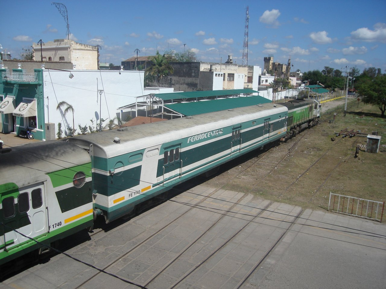 Train departing from La Banda, Santiago del Estero Province.